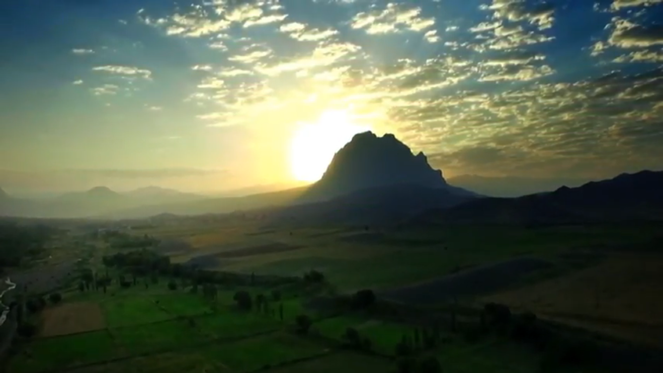 Culfa rayonu, Culfada açılan səhər